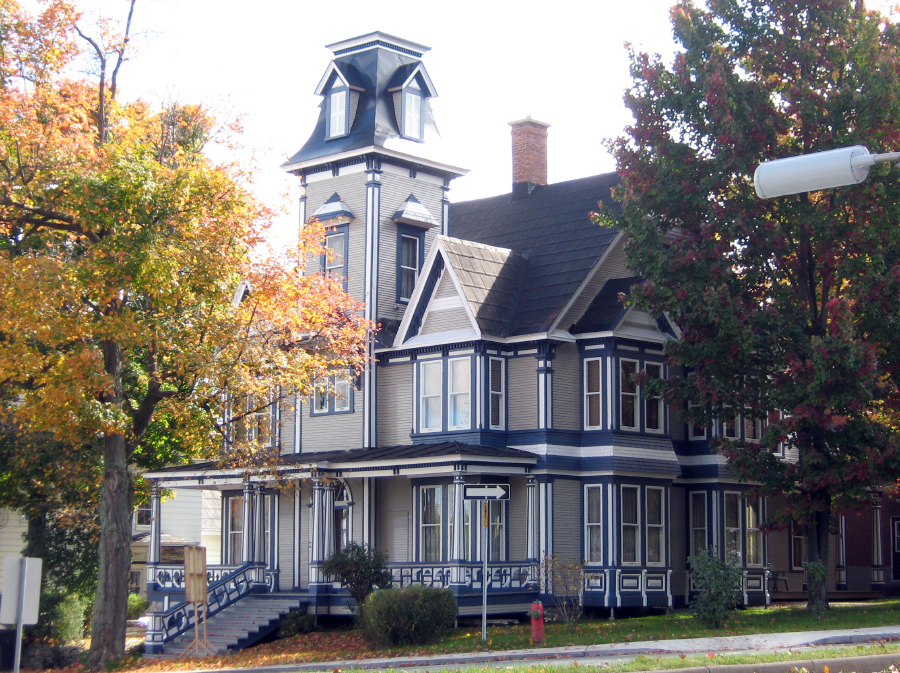 Maison du Vieux-Nord, au coin des rues Queen-Victoria et Moore